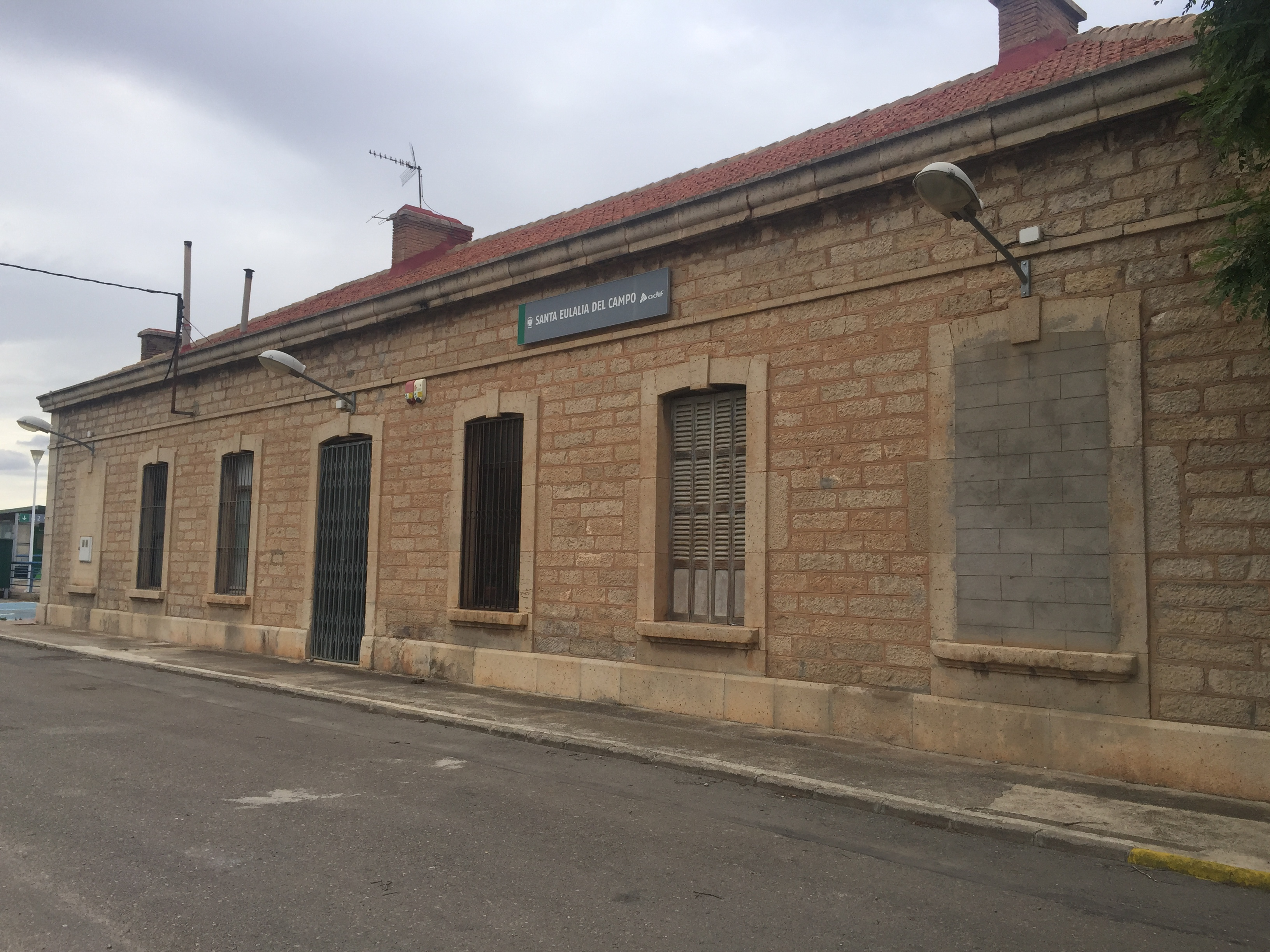 Estación de Ferrocarril ADIF - RENFE Santa Eulalia del Campo (Teruel)